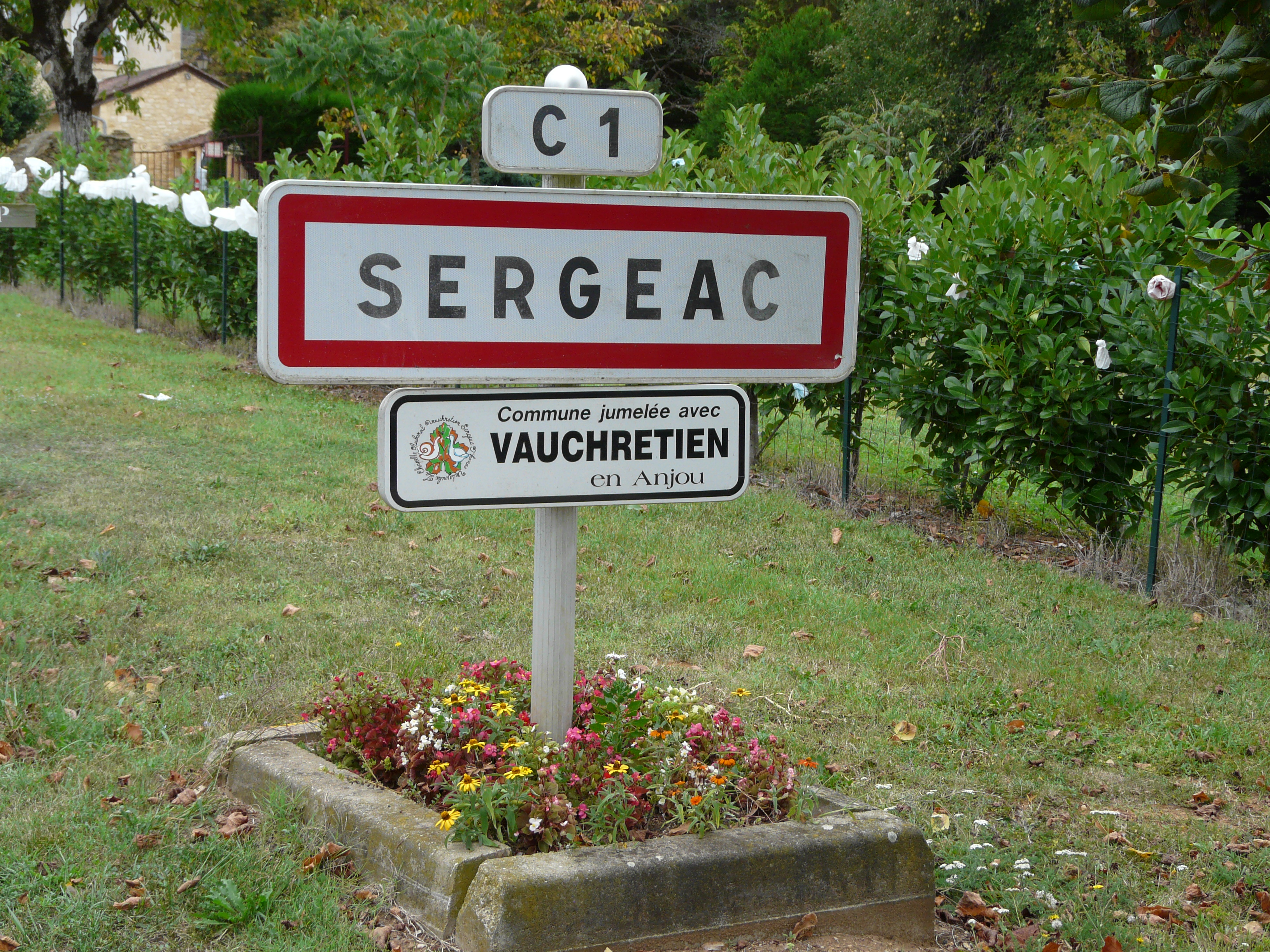 Panneau d'entrée à Sergeac, Dordogne, France.